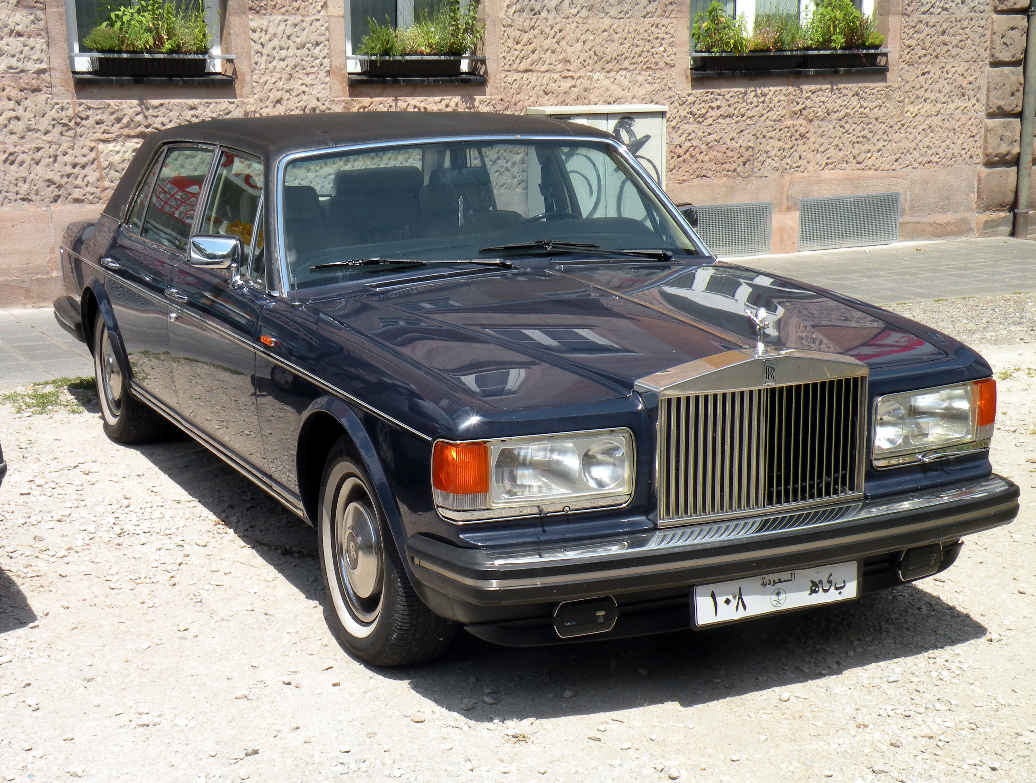 Роллс-Ройс Silver Spur